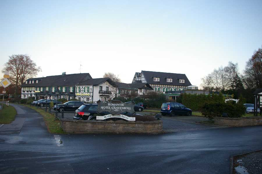 Hotel Gravenberg in Langenfeld-Wiescheid